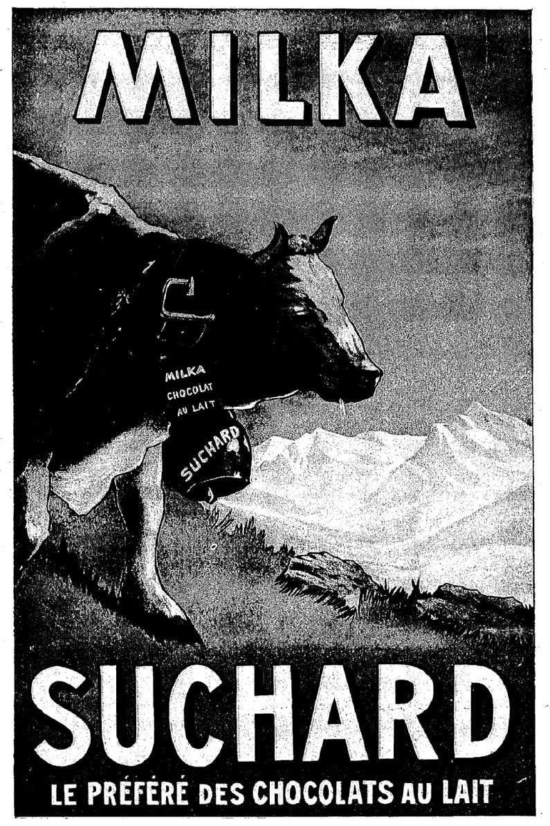 Pub pour le chocolat Milka de Suchard, d'environ 1906. Extrait de l'oeuvre cité, du BNF Gallica.